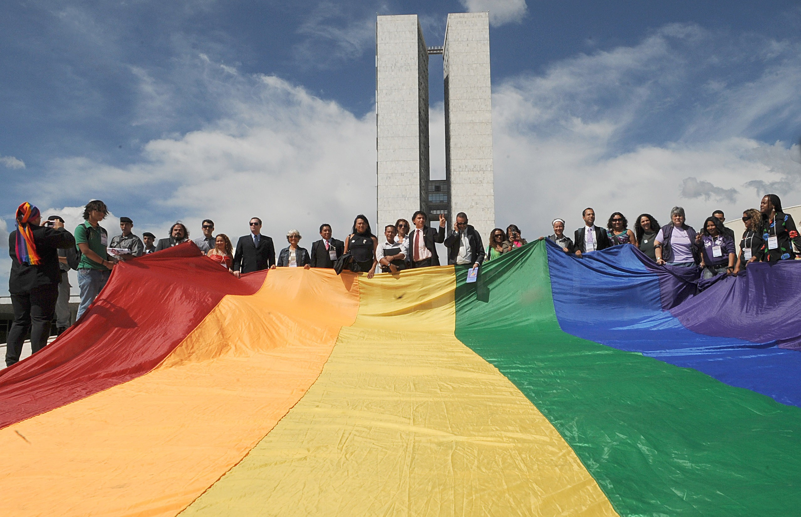 Bandeira LGBT no Congresso Nacional do Brasil